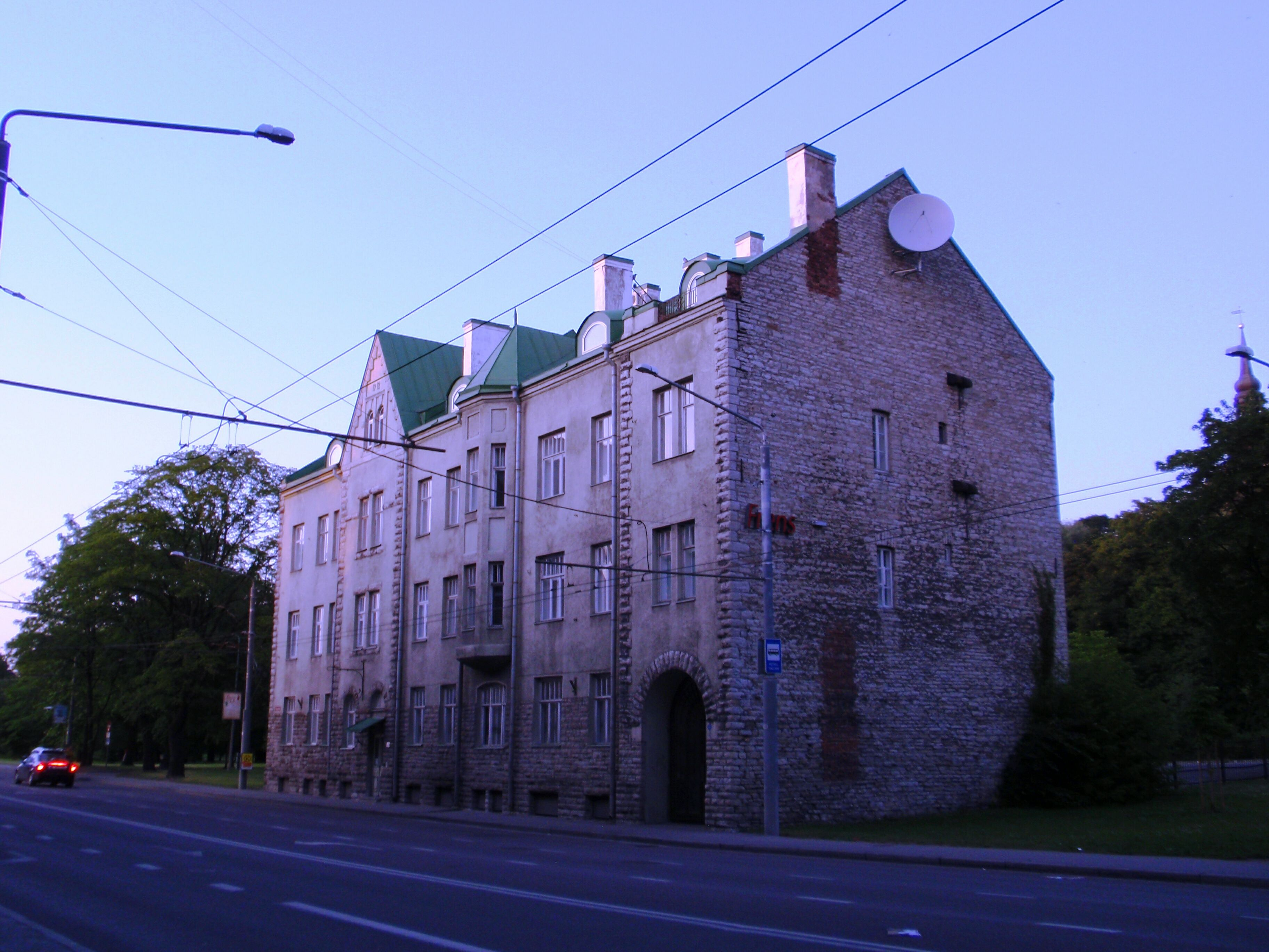 Toompuiestee 30, Tallinn